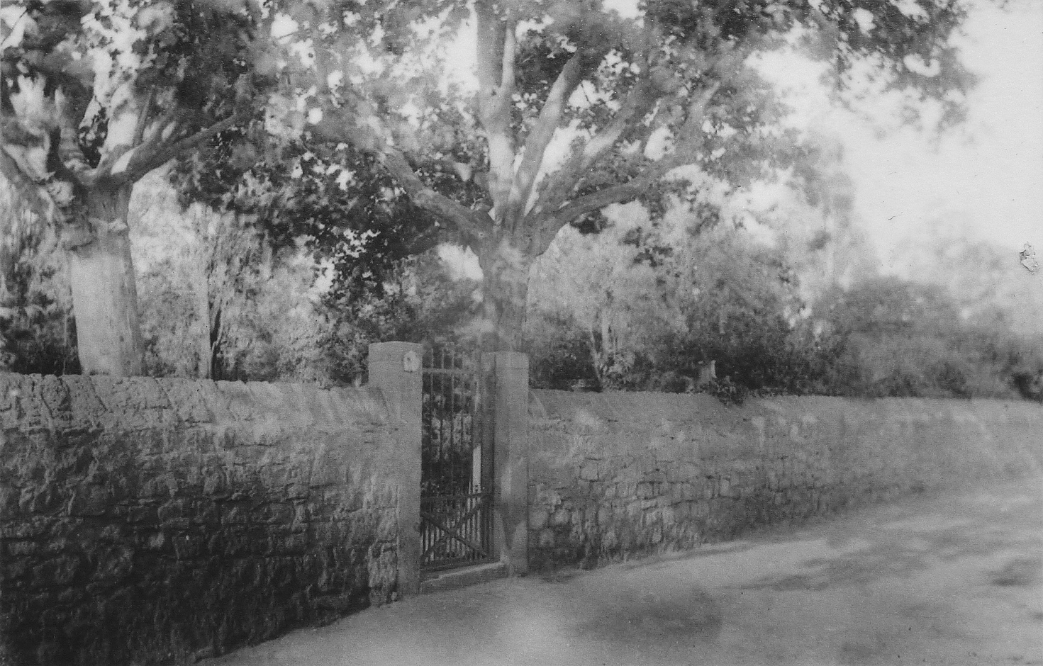 Frankfurt am Main, Stadtteil Bockenheim: Der Alte Friedhof Bockenheim ist ein von 1825 bis 1898 für Begräbnisse genutzter Friedhof, der im Jahr 1916 zu einer öffentlichen Grünanlage umgewidmet wurde. Das Foto zeigt die Nordseite der aus einer Basaltmauer bestehenden Einfriedung mit dem am damaligen Rödelheimer Sandweg (heute Solmsstraße) befindlichen Haupteingang des Friedhofs